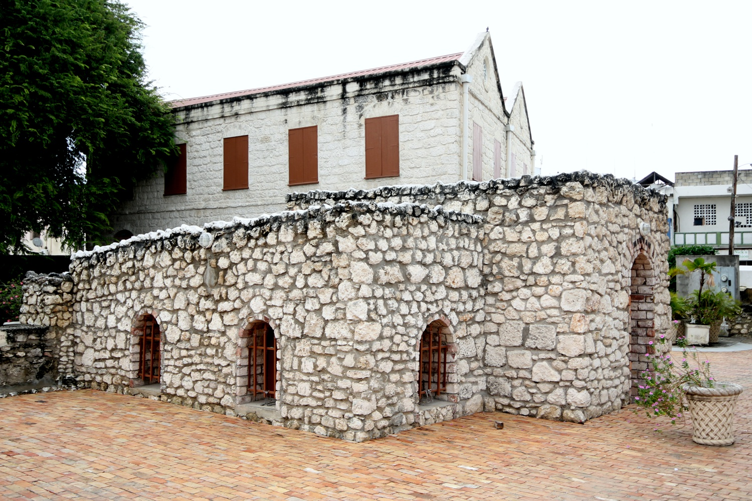 Die Mikwe, das rituelle jüdische Bad, auf dem Gelände der Nidhe Israel Synagoge in Bridgetown (Barbados)